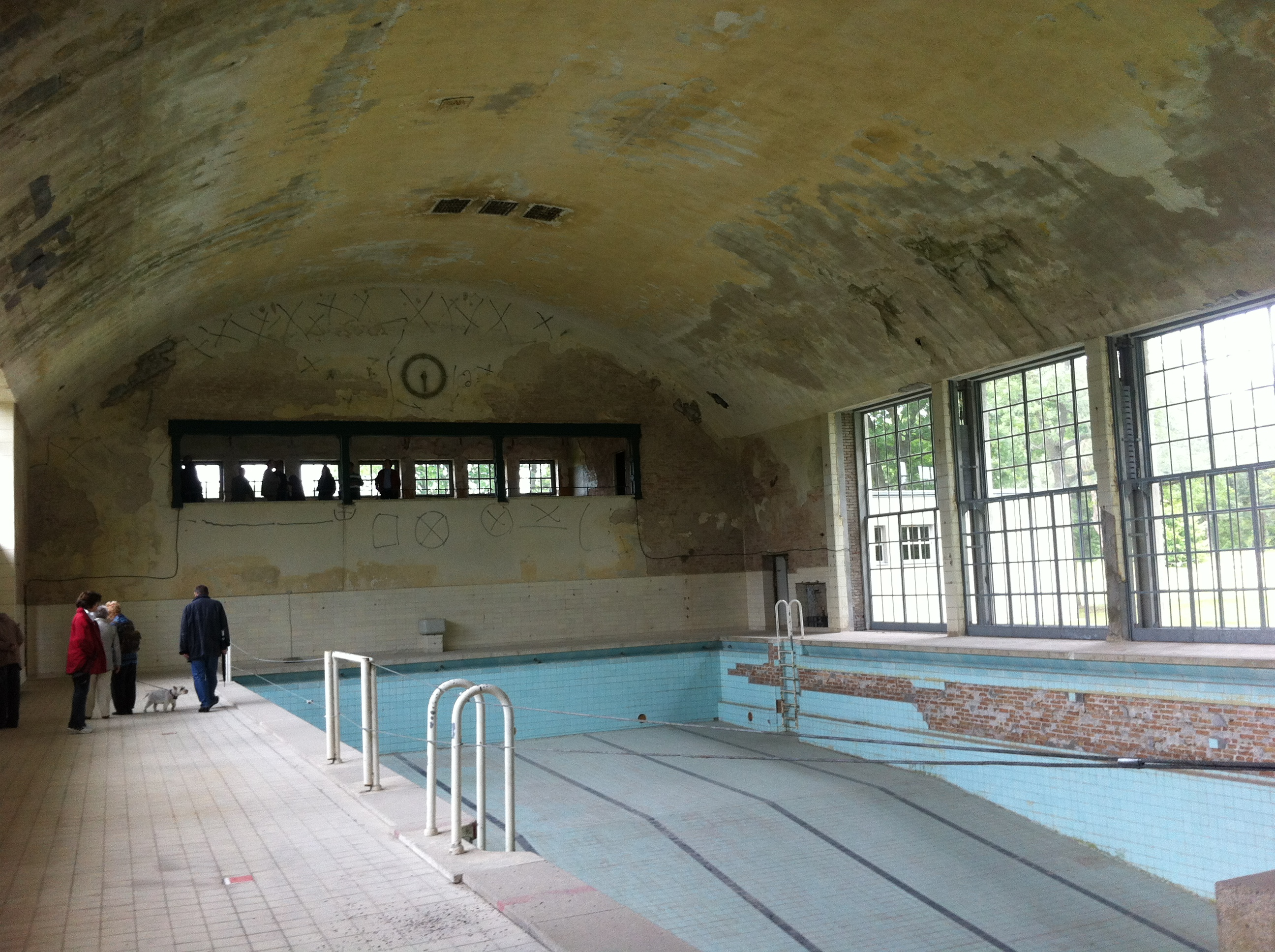 Innenansicht der Schwimmhalle im Olympischen Dorf von 1936. Bild von 2013